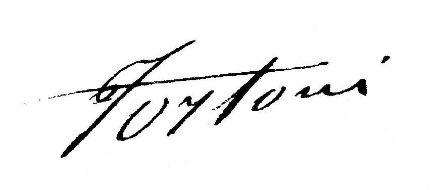 Signature au bas d'un document de métrage par un géomètre